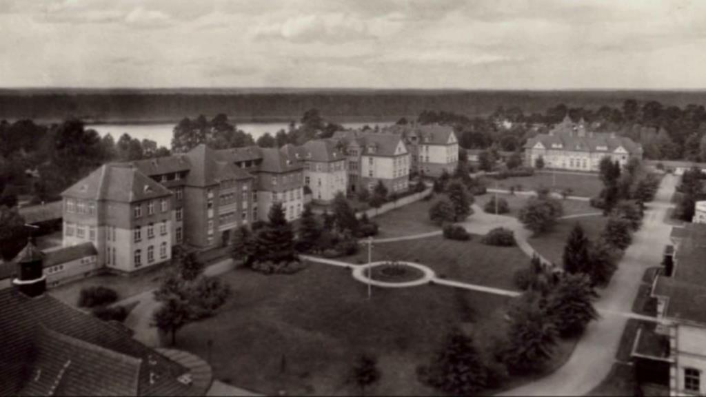 вид